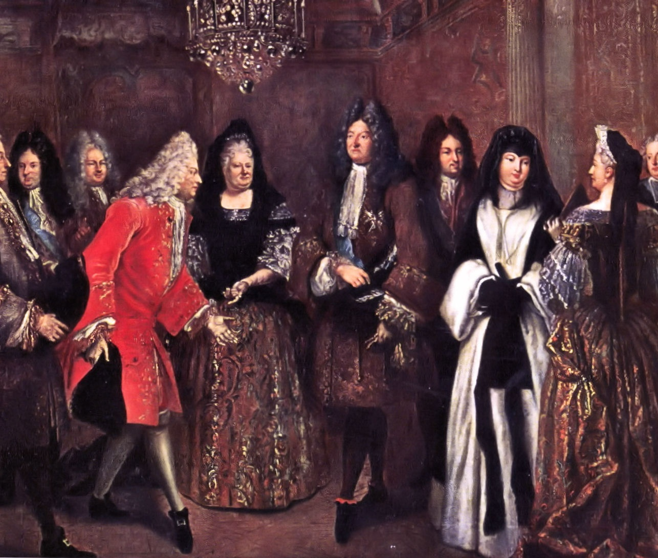 König Ludwig XIV. empfängt den späteren König von Polen und Kurfürsten von Sachsen III. in Fontainebleau. Von 1711 bis 1719 befand sich der Kurprinz auf seiner Kavallierstour durch Europa. Im Herbst 1714 machte er in Paris Station. Rechts Ludwig XIV., in der Mitte dessen Schwägerin Liselotte Herzogin von Orléans, links August. Dies war einer der letzten großen Empfänge des französischen Königs.